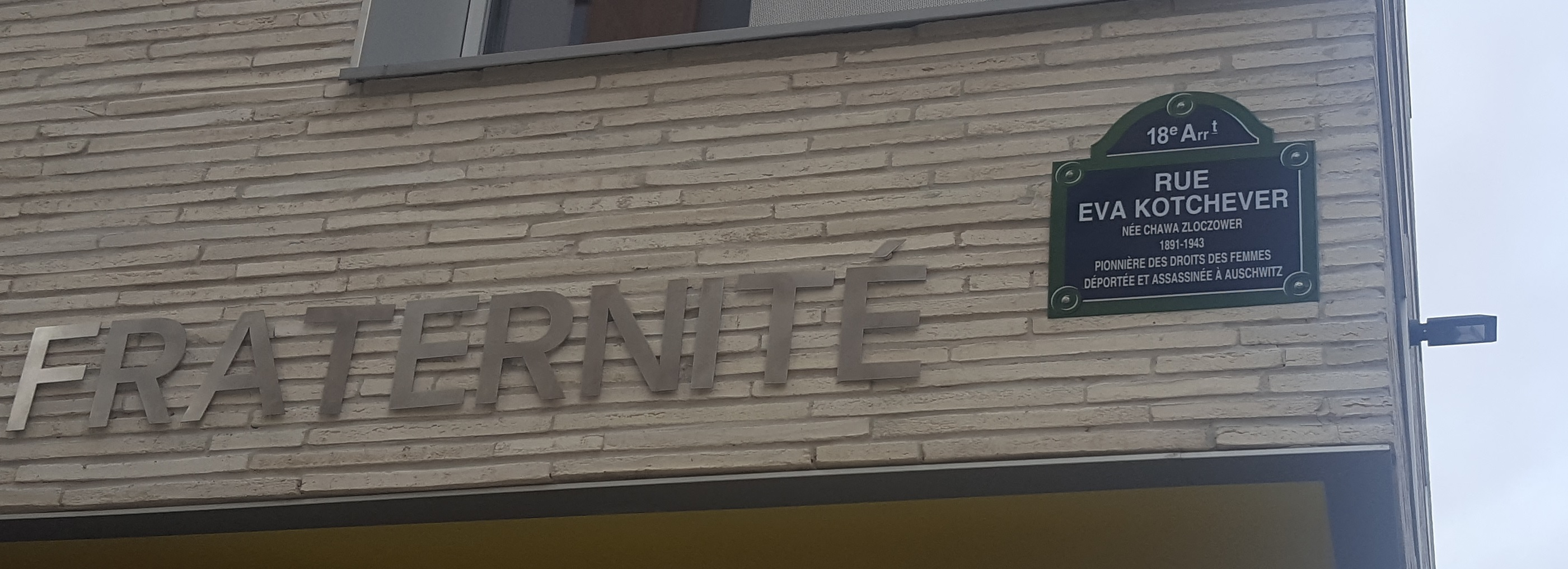 Plaque en hommage à Eva Kotchever à Paris 18e